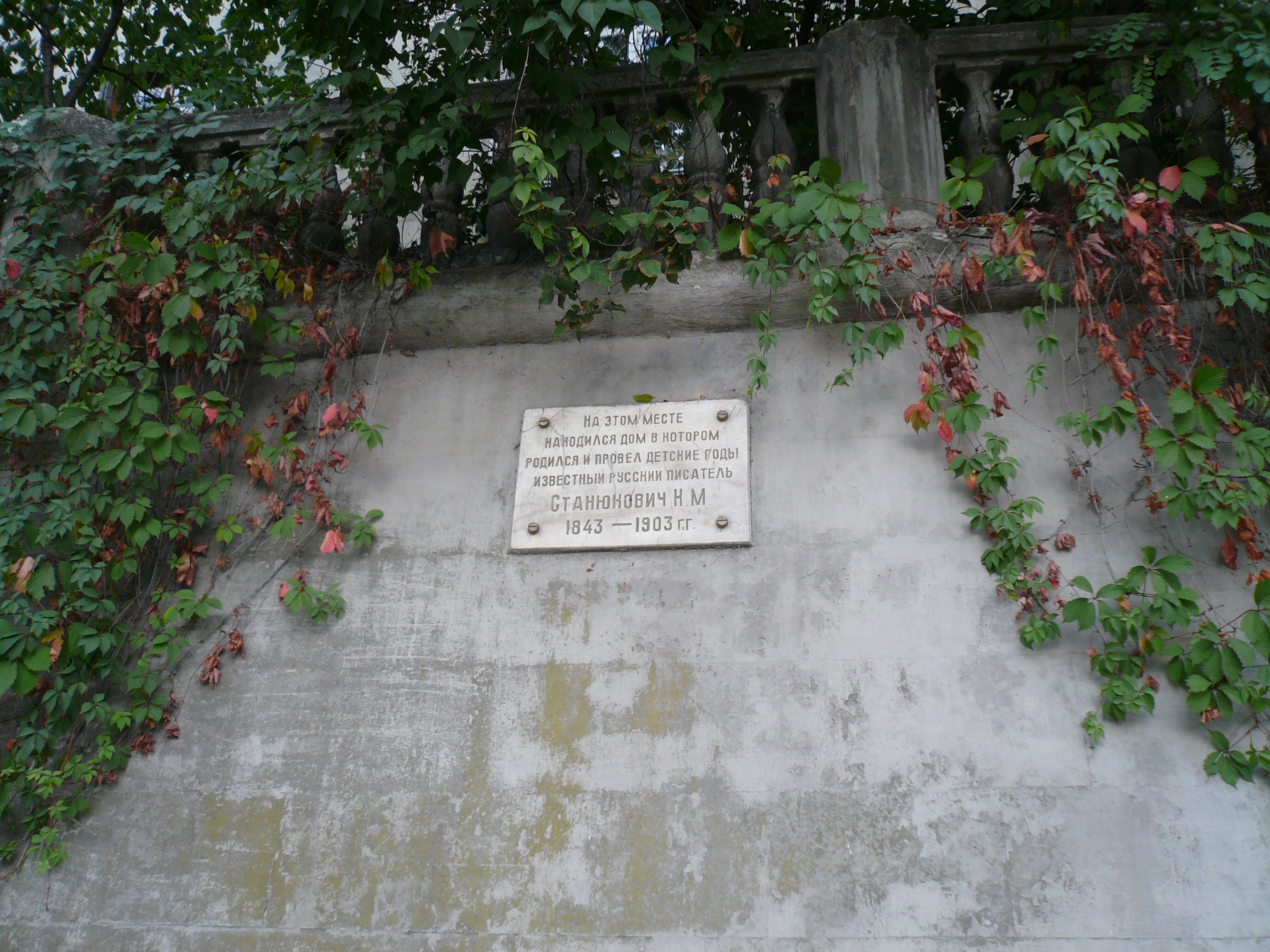 Памятная доска на месте бывшего дома К.М. Станюковича в Севастополе. Надпись на доске: "На этом месте находился дом, в котором родился и провёл детские годы известный русский писатель Станюкович К.М. 1843-1903 г.г.".